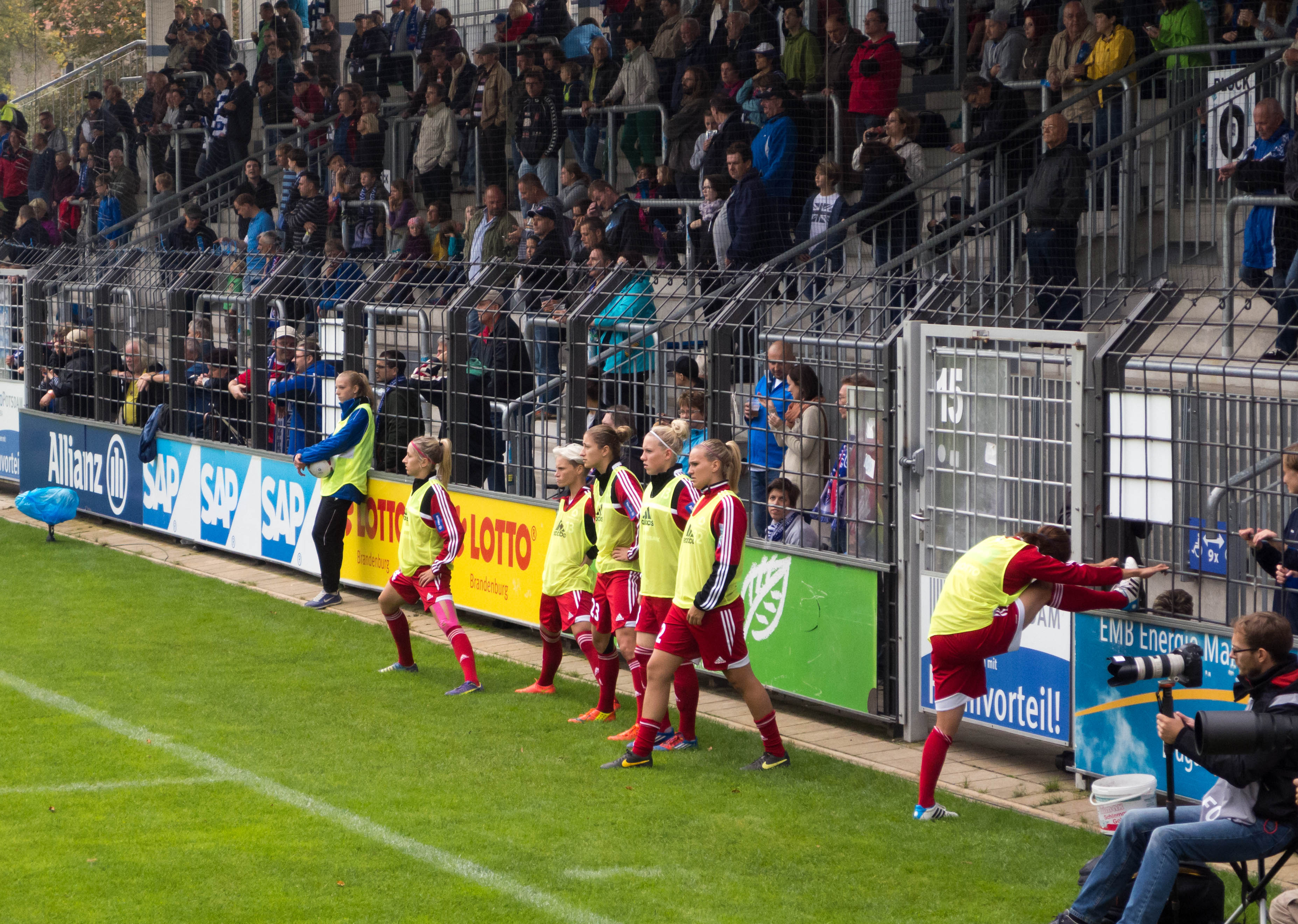 am 21.9.2014 in Babelsberg/Potsdam Endstand 2:1